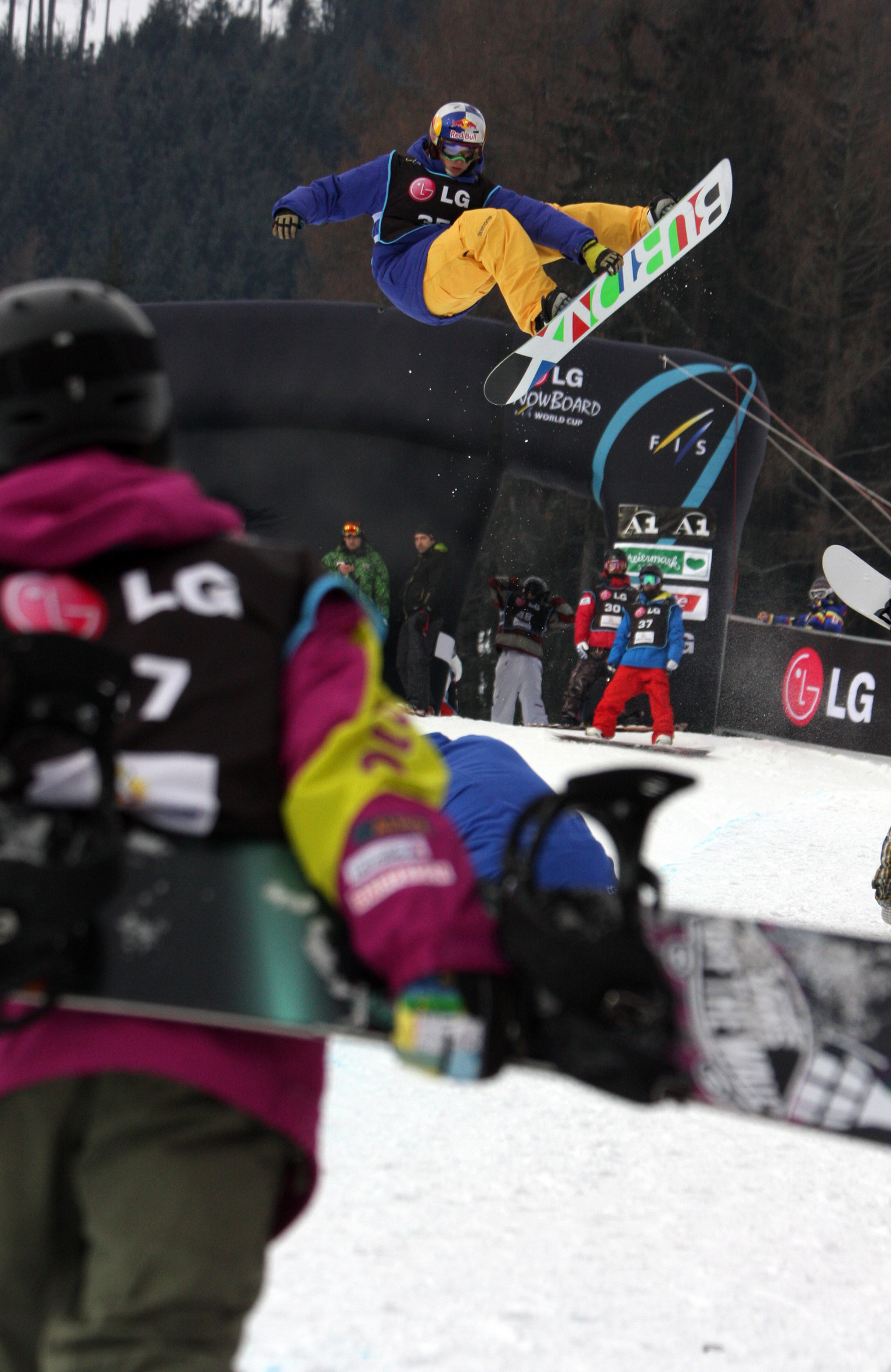 Kreischberg_HP_Seppe_Smits_BEL